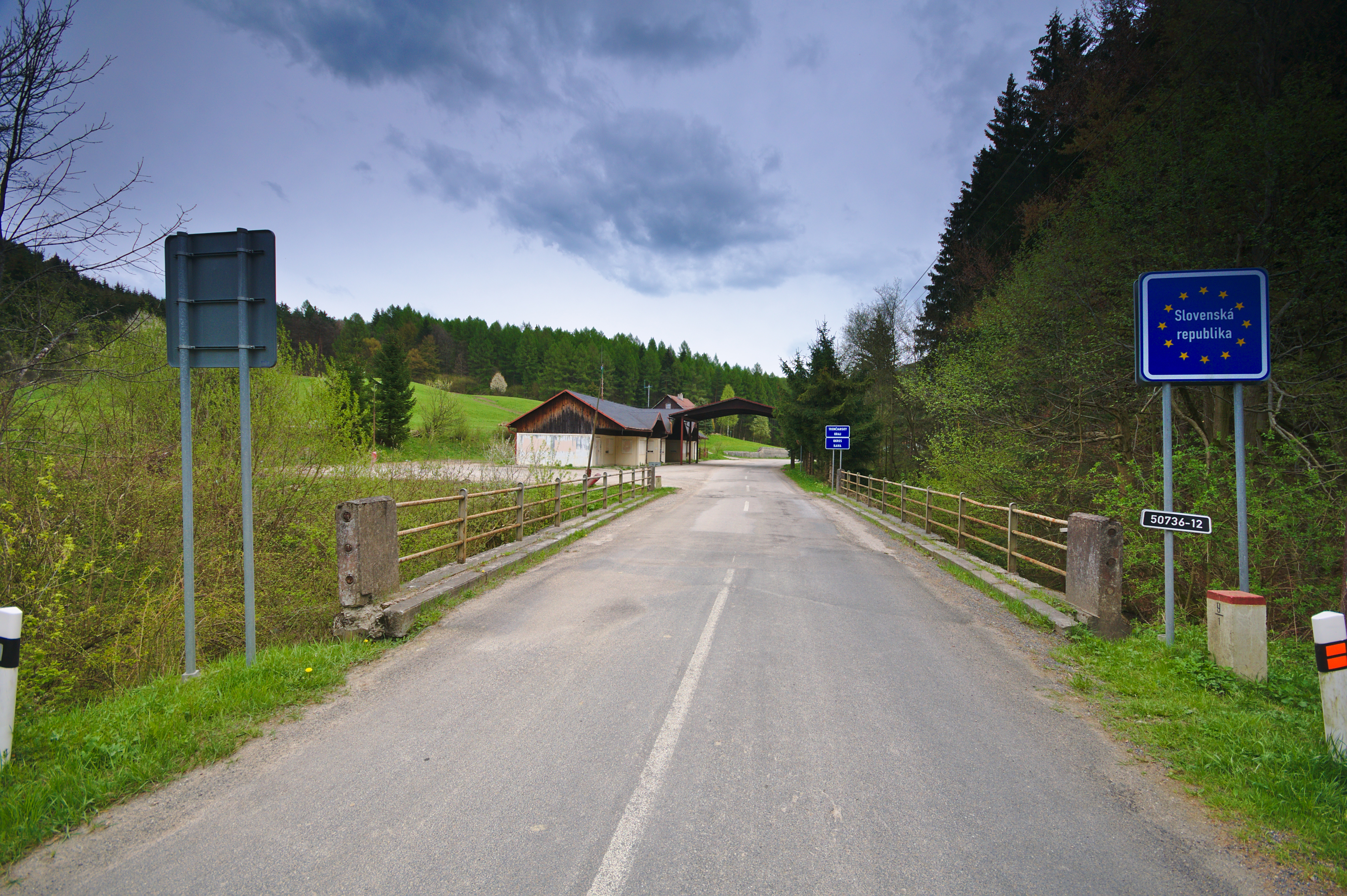 Hraniční přechod, Nedašova Lhota - Červený Kameň, okres Zlín